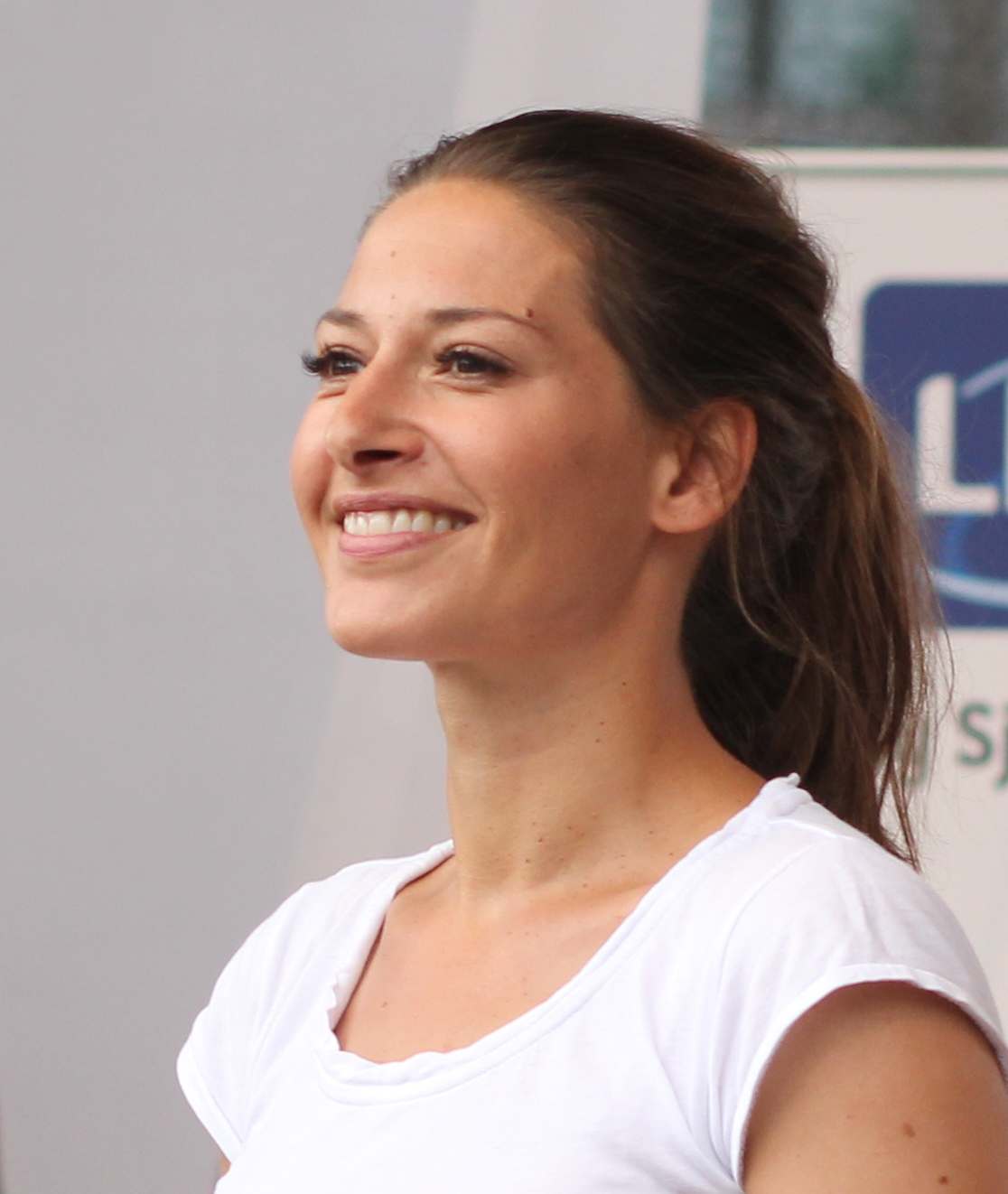 Pia Tjelta, norsk skuespiller